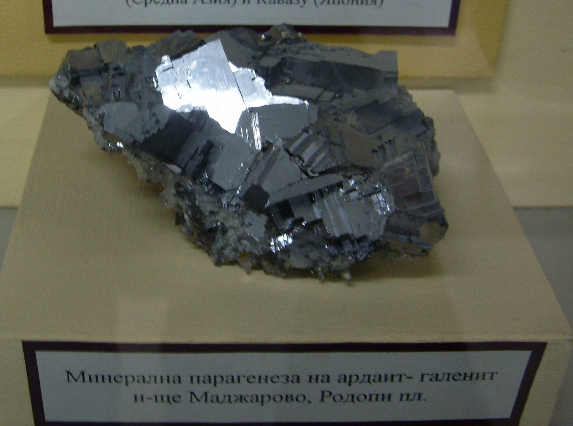 Парагенеза ардаит и галенит, Маджарово, България